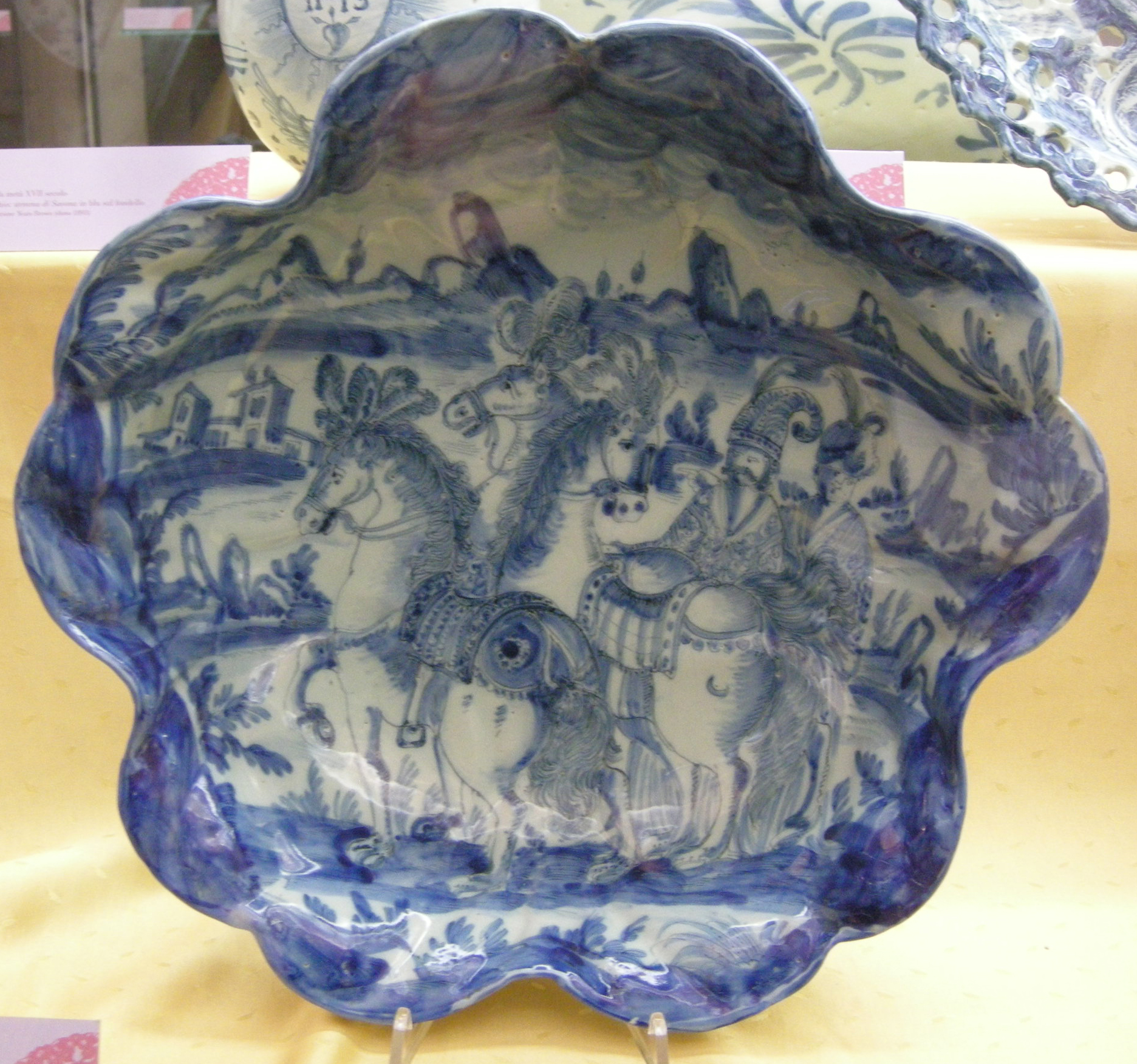 Albisola, manifattura conrado, bacile, xvii secolo